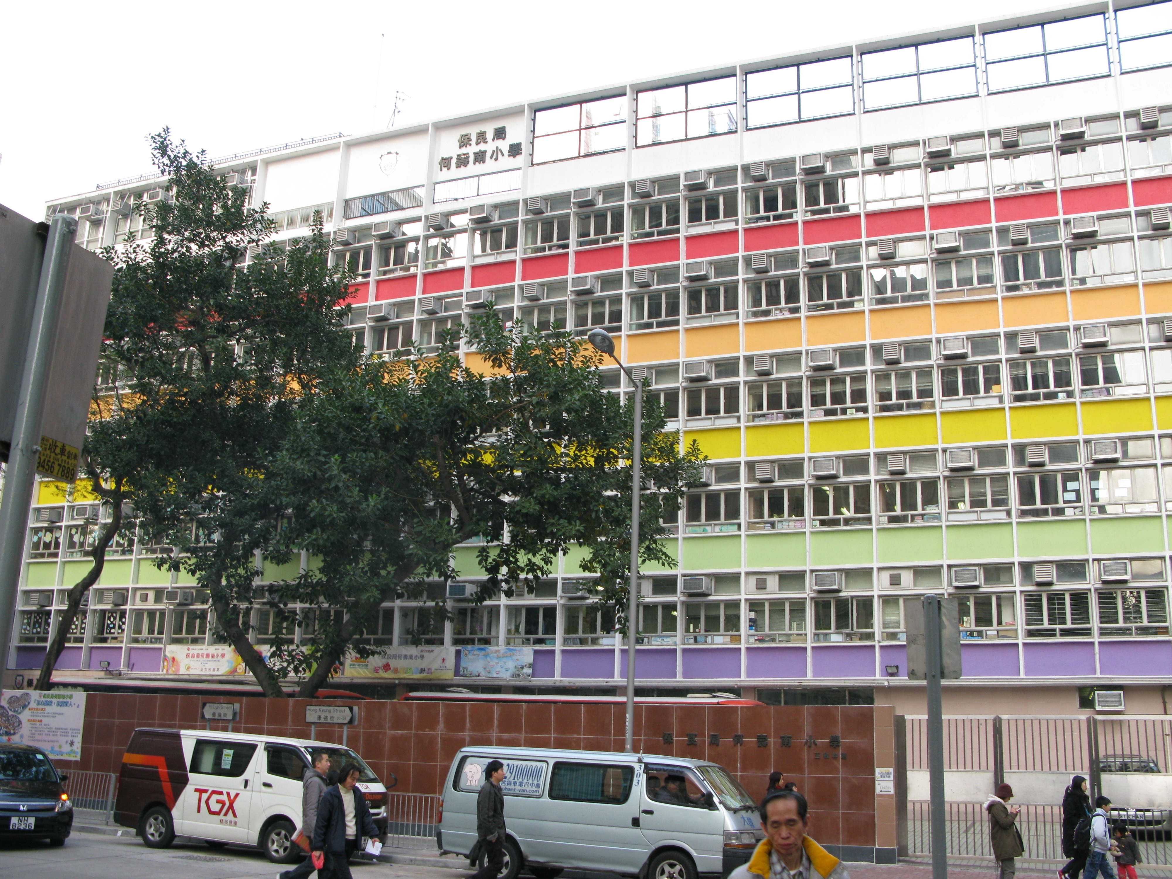 中文（香港）: 香港新蒲崗保良局何壽南小學